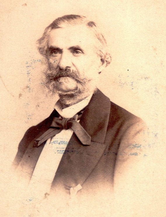 Alexandru Orăscu (cunoscut mai ales ca Alexandru Orăscu, n. 30 iulie 1817, Bucureşti – d. 16 decembrie 1894, Bucureşti) - arhitect - Biblioteca Academiei Române - Direcția de Stampe